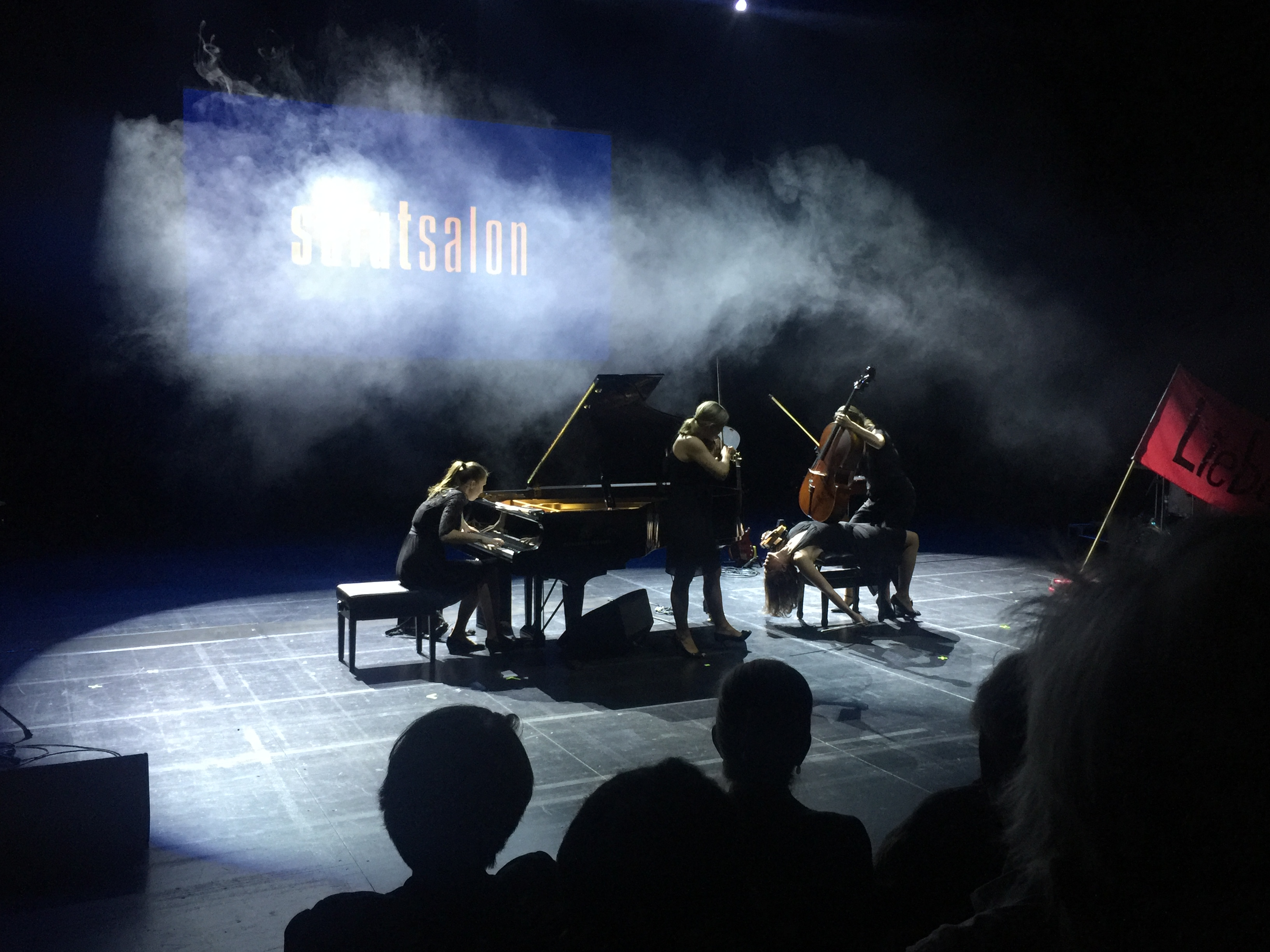 20 Jahre Bürgerstiftung: Bei der offiziellen Feier spielte u.a. das Hamburger Klassik-Quartett Salut Salon